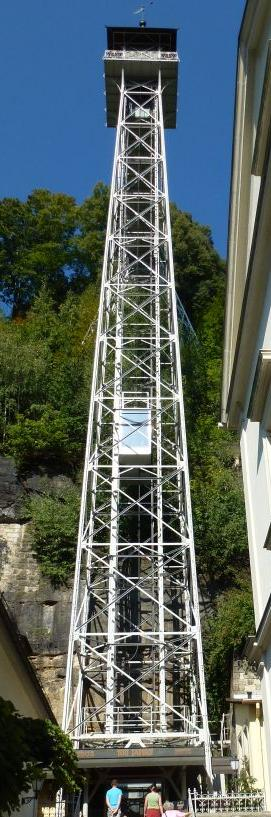 Personenaufzug in Bad Schandau